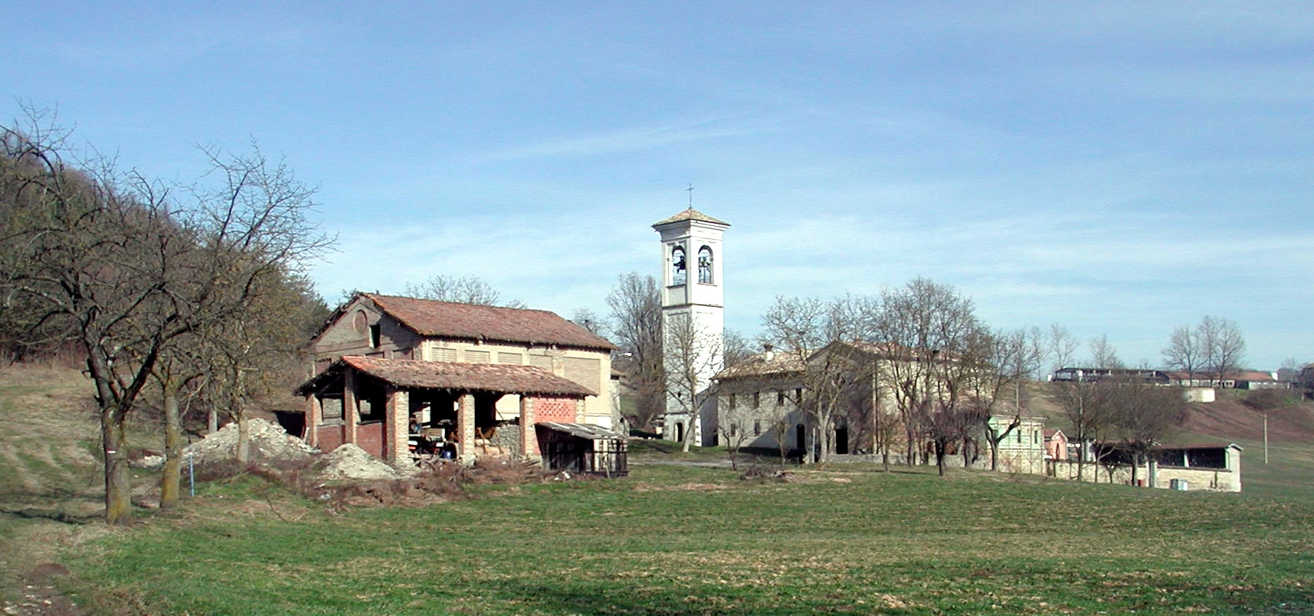 San Donnino, Carpineti, provincia di Reggio Emilia, italy Appennino reggiano